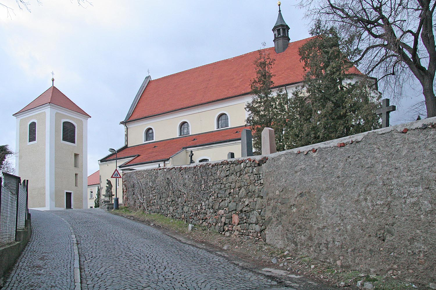 Kostel svatého Mikuláše se zvonicí na Karlově v Benešově